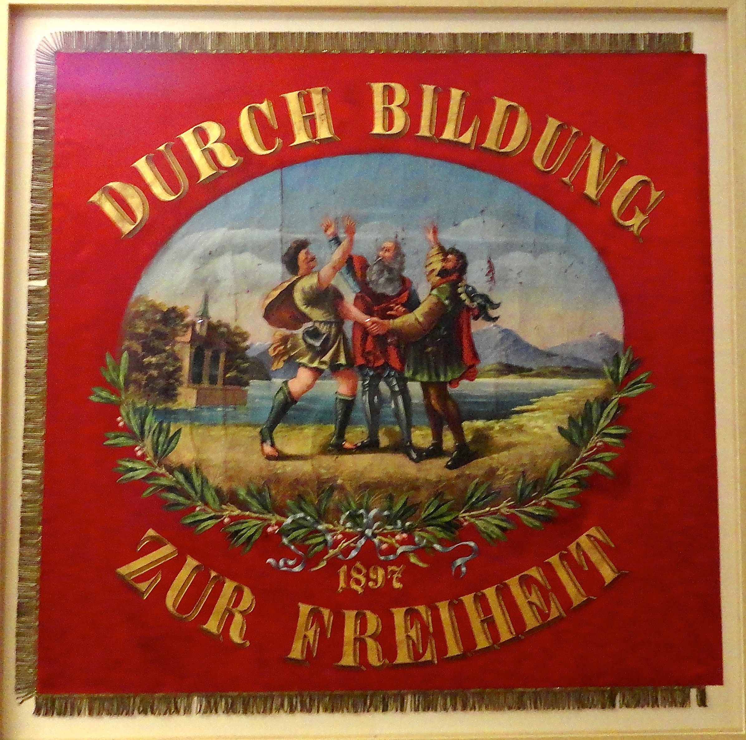 Fahnes Grütlivereins Arosa, 1897